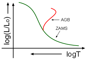 Representación esquemática da curva de secuencia principal de idade cero o ZAMS (zero age main sequence) xunto coa rama asindótica das xigantes o AGB (asymptotic giant branch). Unha estrela parte da curva verde e evoluciona a través da curva vermella diminuíndo a súa temperatura efectiva e aumentando a súa luminosidade.